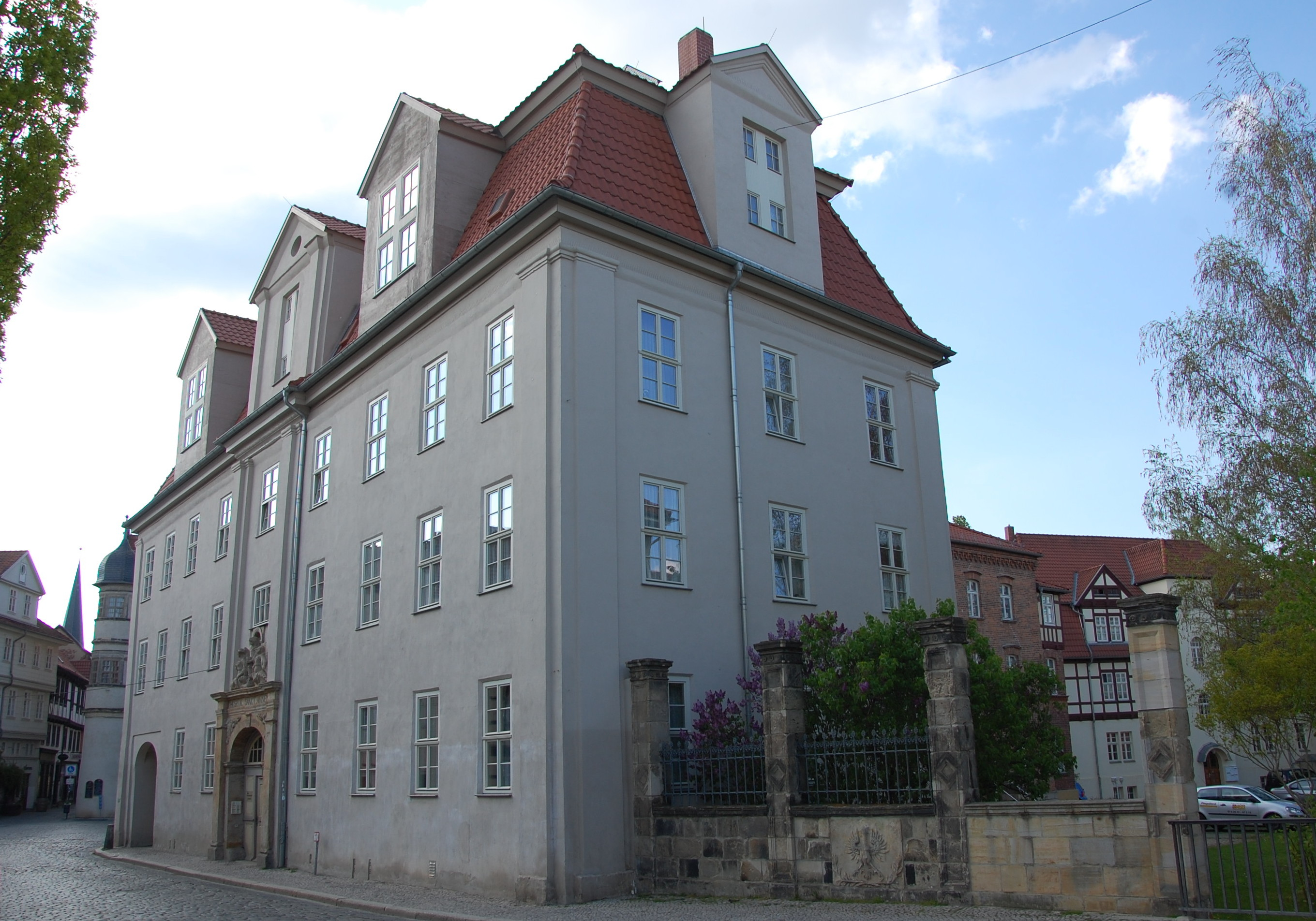 Haus Zwischen den Städten 2, 3 in Quedlinburg